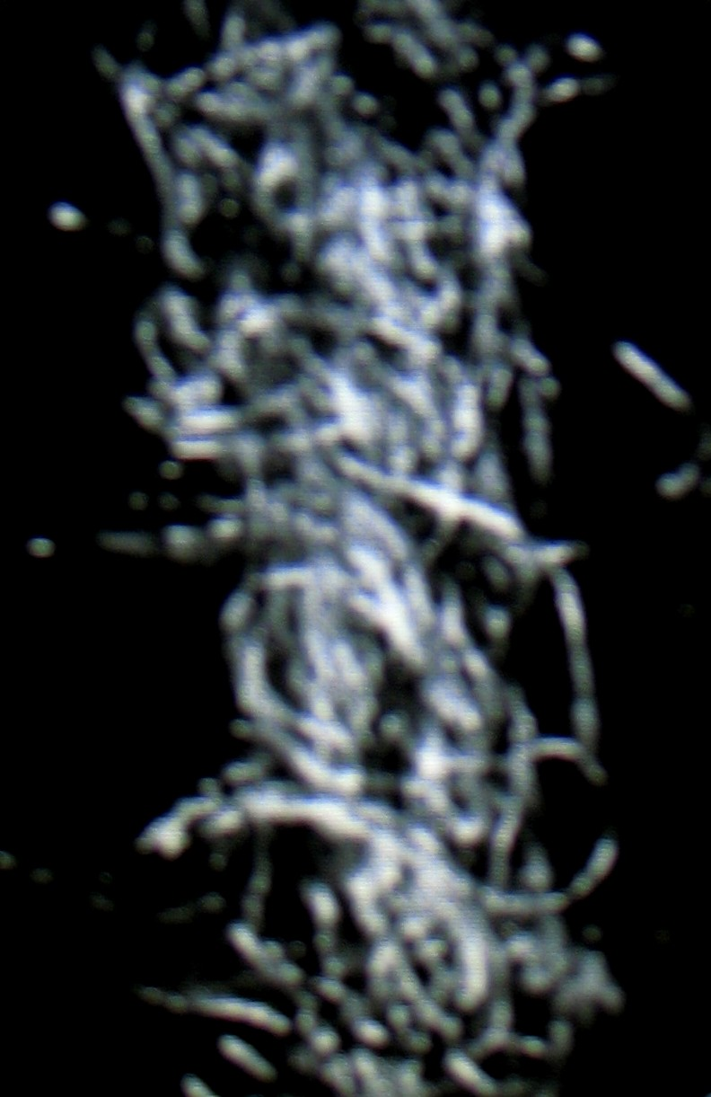 Garn aus Reißwolle Mungo